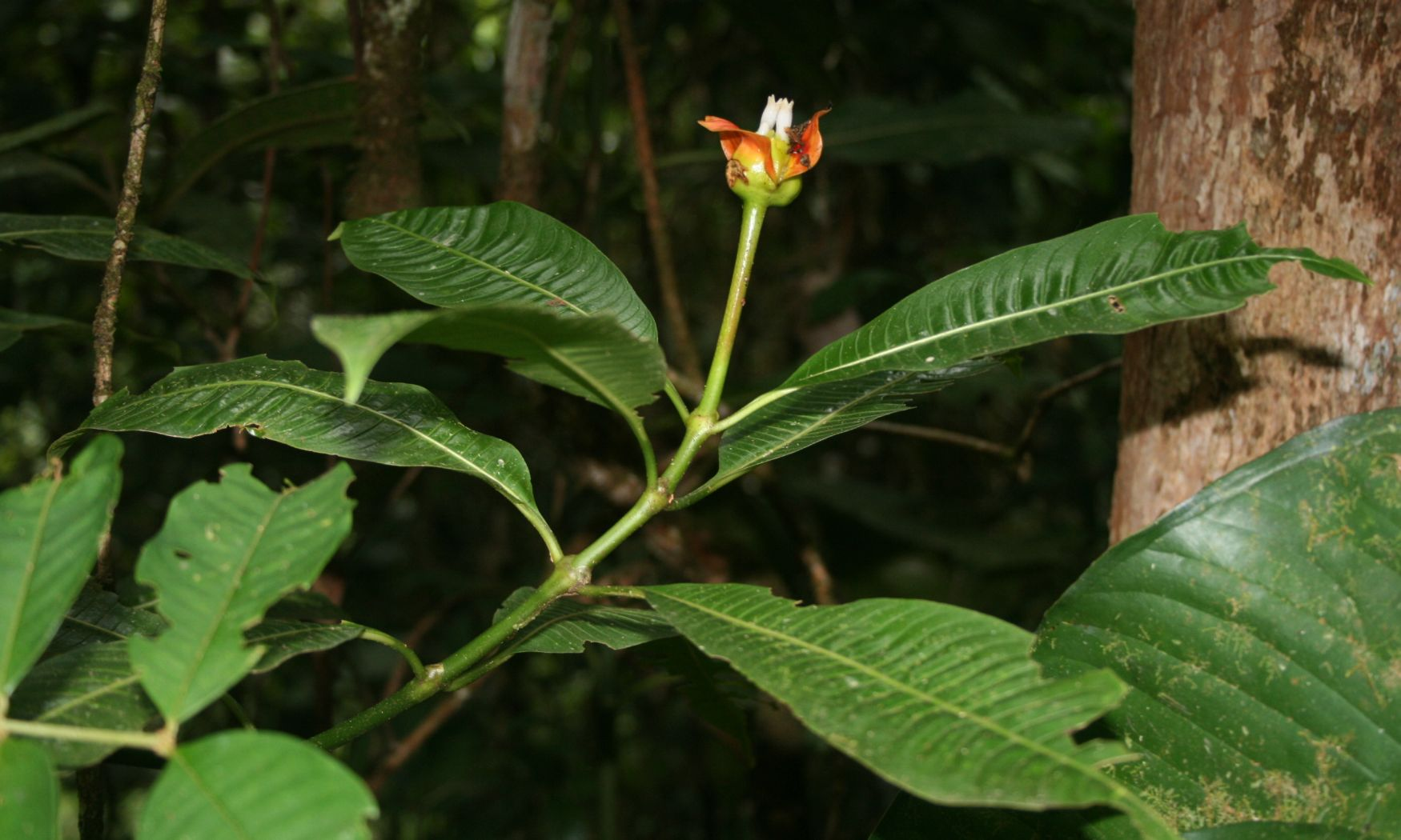 Psychotria elata, Kaffeegewächse (Rubiaceae) - Costa Rica: Prov. Puntarenas, La Gamba NW Golfito, "Fila Trail" NW "Tropenstation La Gamba"/"Estación Biológica La Gamba"